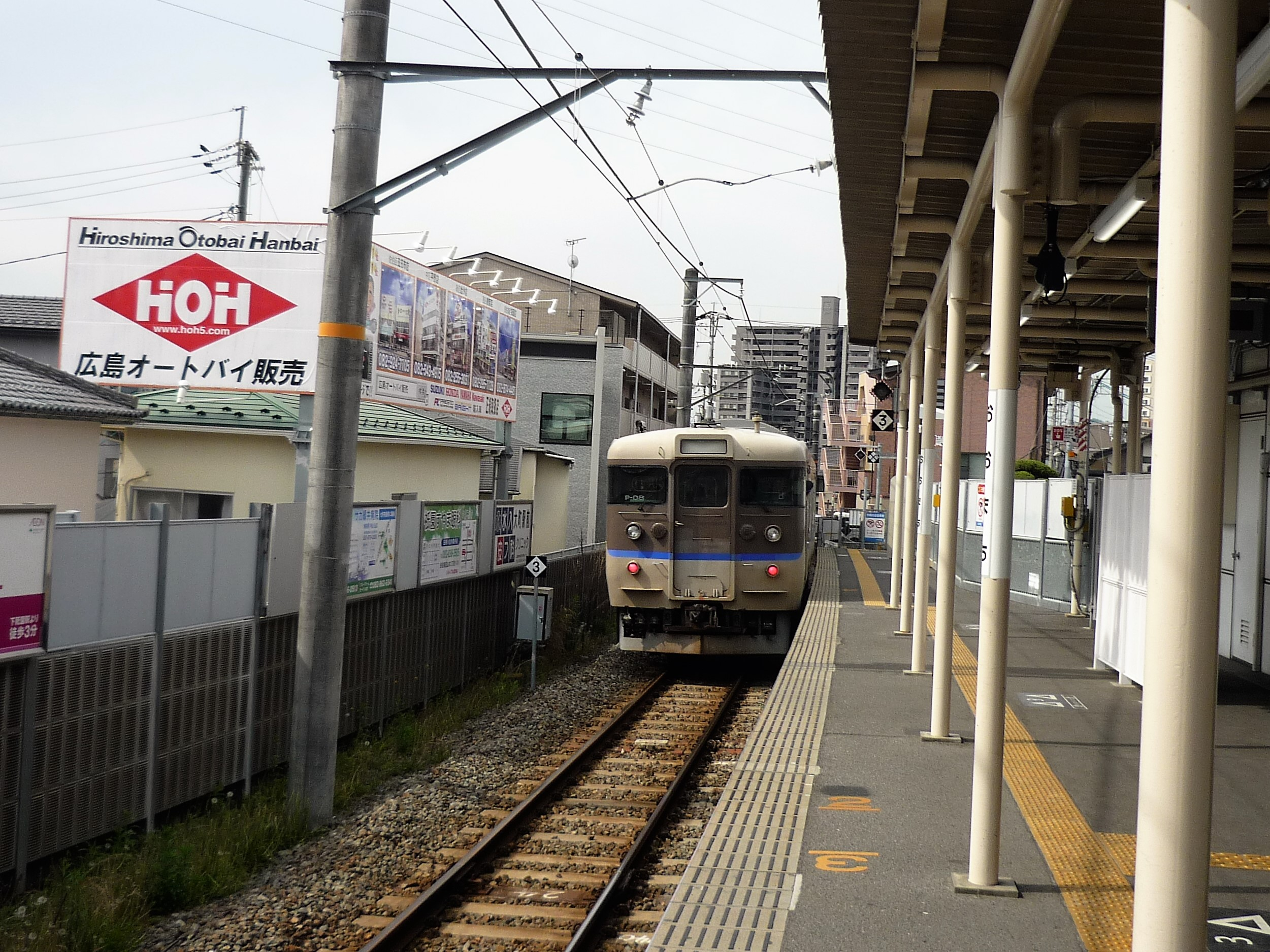 可部線大町駅を出発する113系P08編成